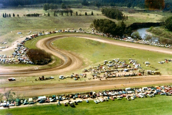 El 1º DE ABRIL DE 1979 en una competencia de LIMITADA SANTAFESINA y FORMULA 4 organizada por la MUTUAL AUTOPEÑA OLIVEROS en el Circuito "GENERAL SAN MARTIN" abonaron entradas 4.605 espectadores. El ganador de la final de LIMITADA fue el corredor OSCAR "POPPY" LARRAURI. Calificación de la organización por parte de la FEDERACION DE AUTOMOVILISMO: 9 puntos (distinguido)